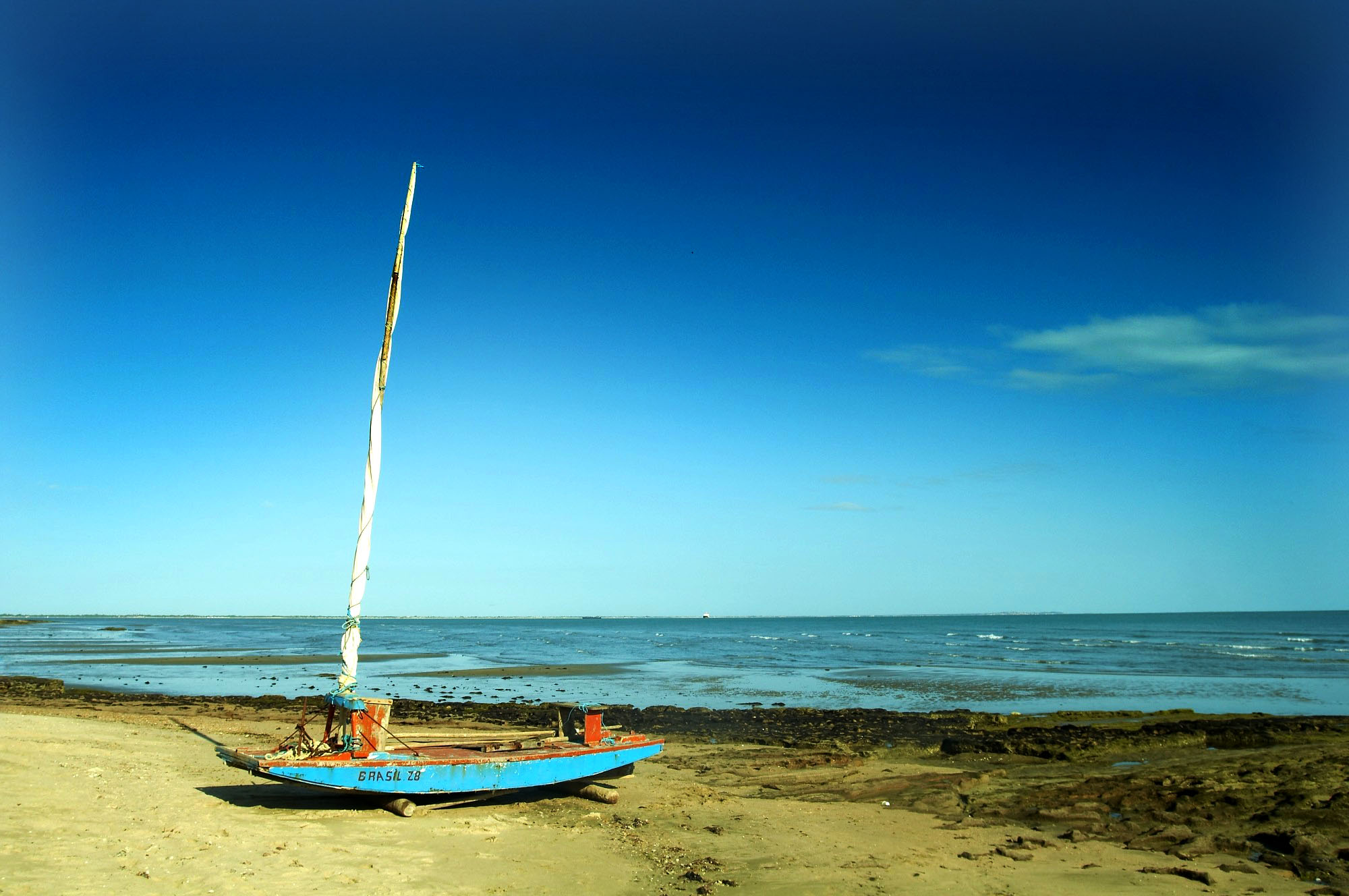 Praia de Upanema em Areia Branca, Rio Grande do Norte, Brasil. Upanema Beach in Areia Branca, Rio Grande do Norte, Brazil.